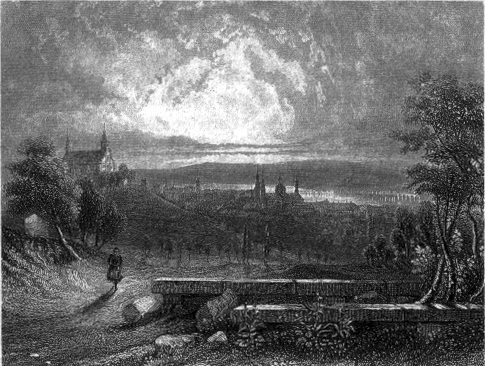 Fulda, ca. 1830, Stahlstich (Ich würde schätzen: Blick auf dem Dom von Horas aus)